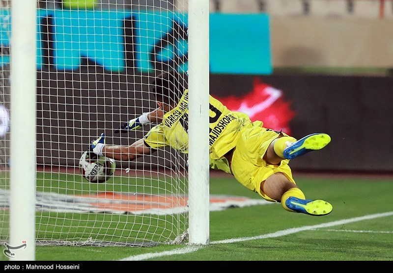 مازِرونی: نساجی و پرسپولیس کا